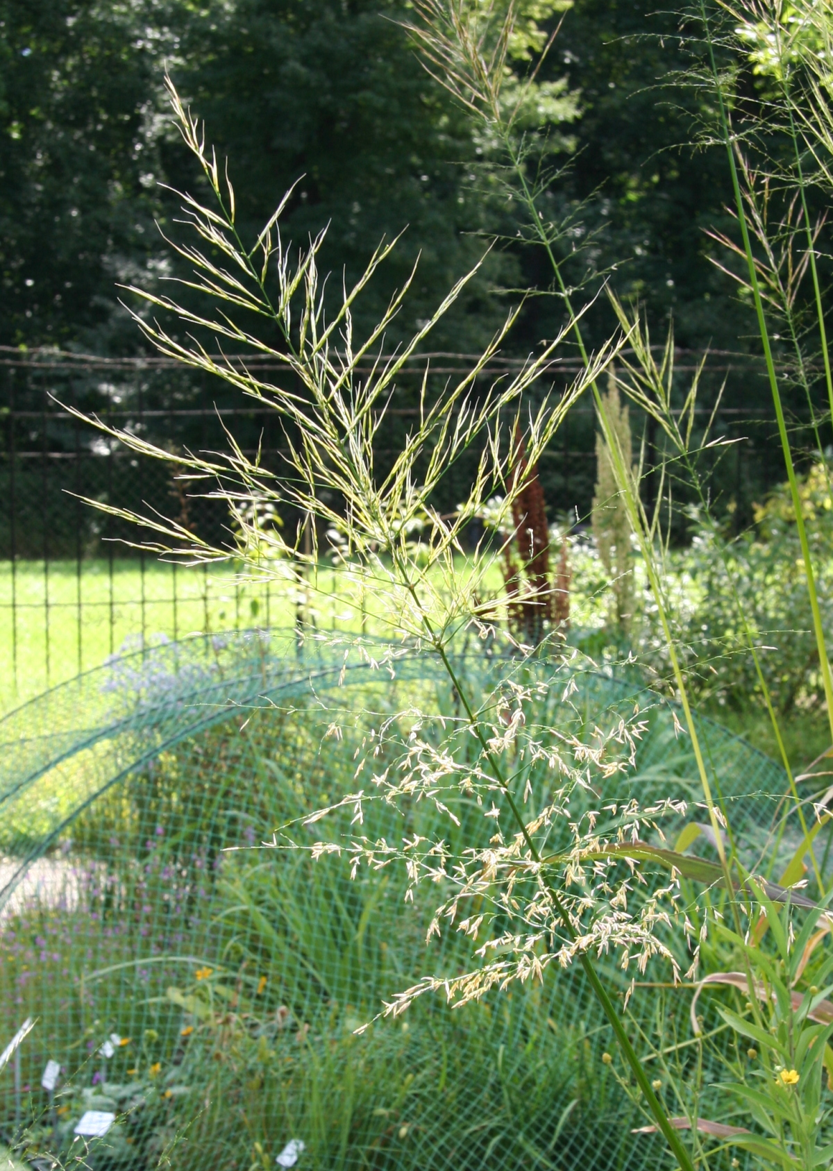 Zizania aquatica im Botanischen Garten Dresden